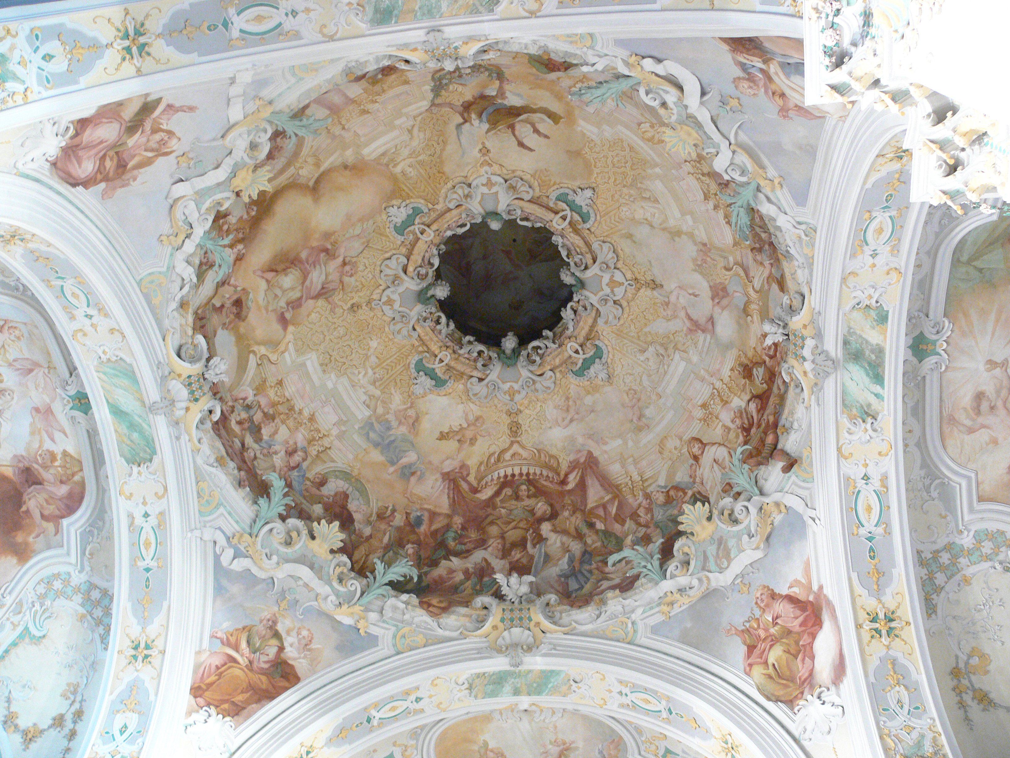 Pfarrkirche St. Katharina (Wolfegg): Chorkuppel Gemälde: Martyrium der Hl. Katharina (Katharina vor dem römischen Kaiser Maximinus Daja), vermutlich entworfen von Franz Joseph Spiegler, vermutlich ausgeführt von dessen Schüler Franz Anton Erler um 1735 Stuck: Johannes Schütz (1704-1752)